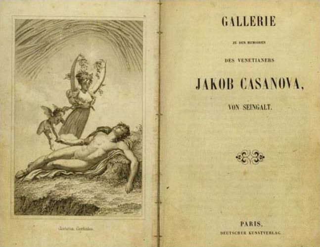 Gallerie zu den Memoiren des Venetianers Jakob Casanova von Seingalt. Frontispiz „Aurora Cephalus“ und Titelseite.